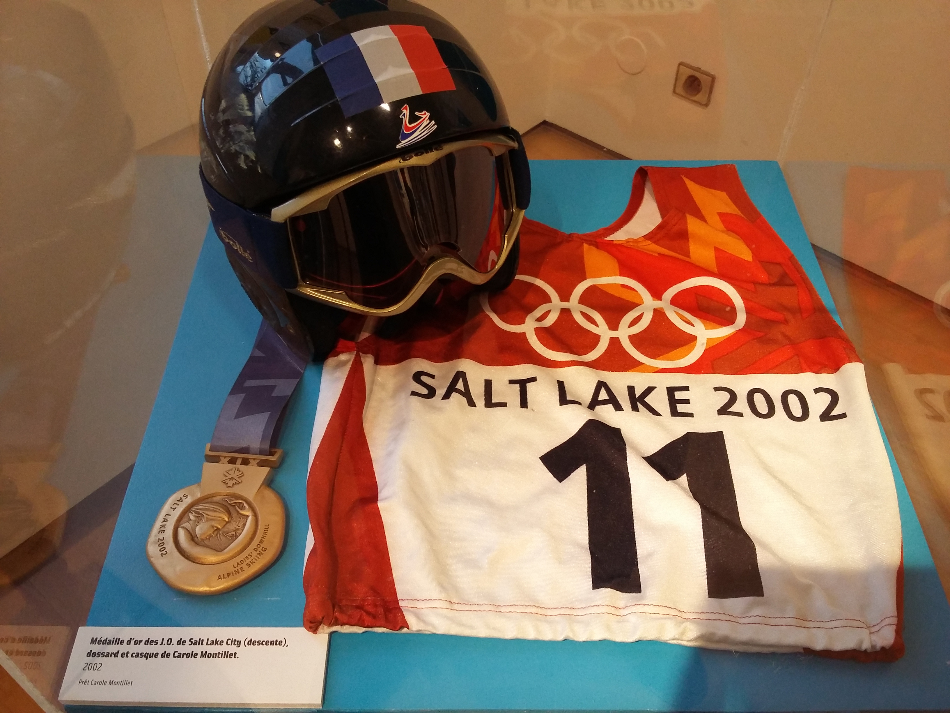 Casque, dossard et médaille d'or de la skieuse française Carole Montillet aux jeux olympiques de 2002.